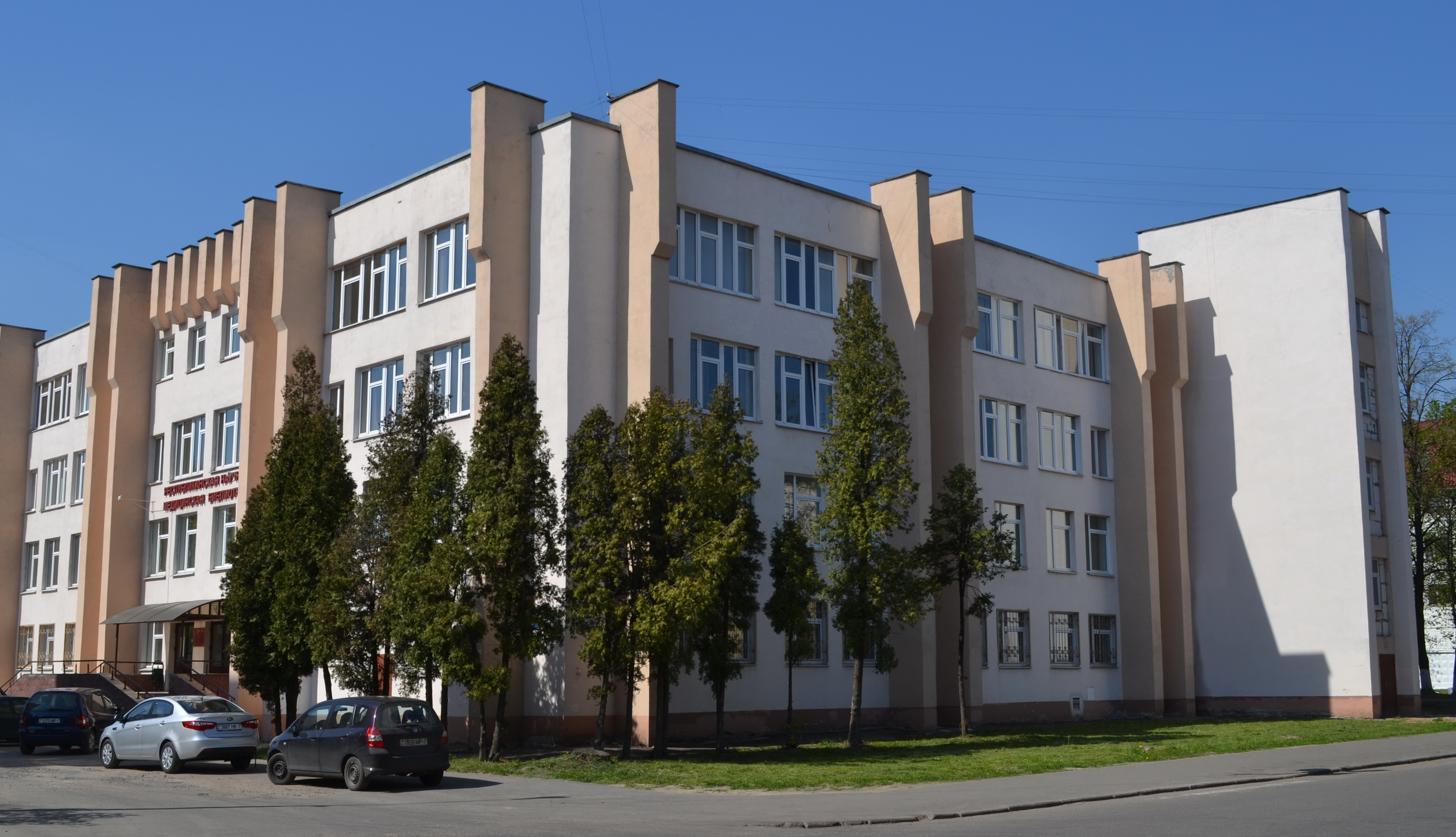 ГУ РНМБ фасад